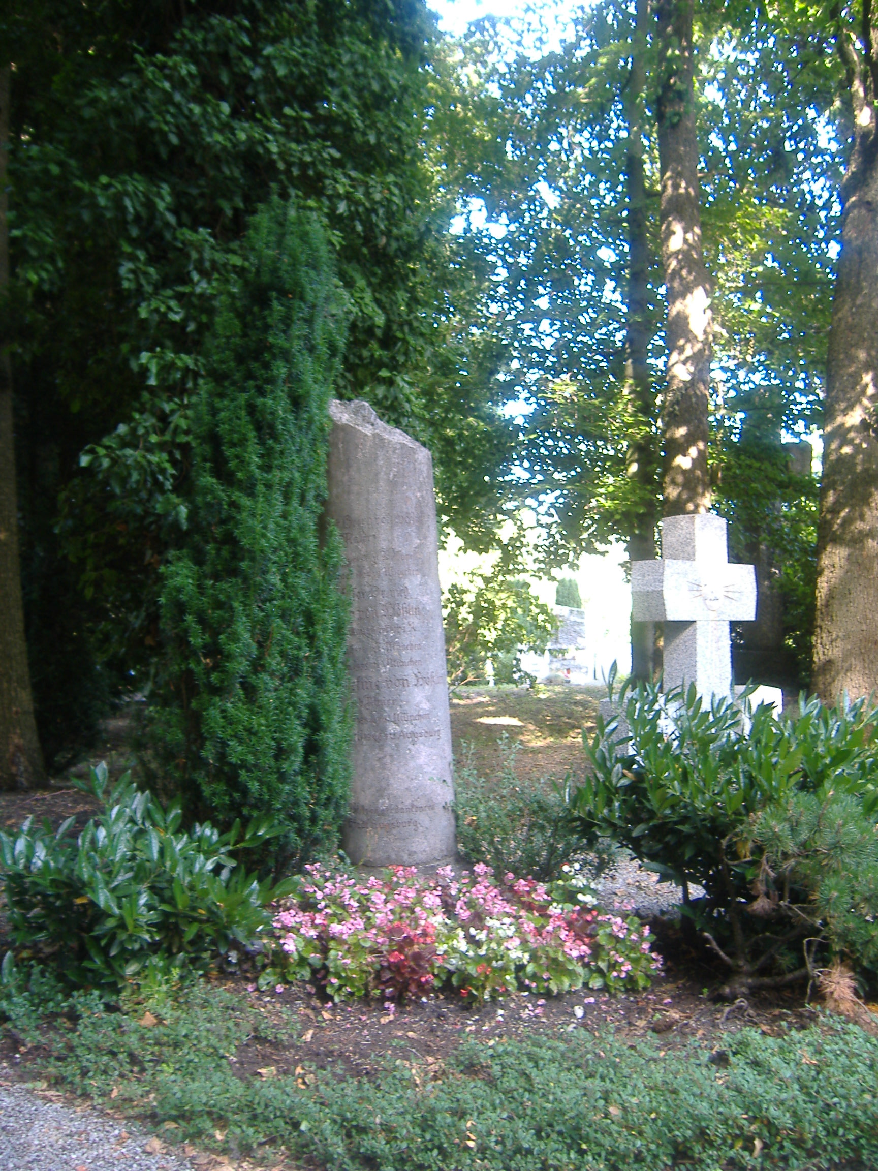 Ehrengrab von George von Hösslin auf dem Westfriedhof in Augsburg